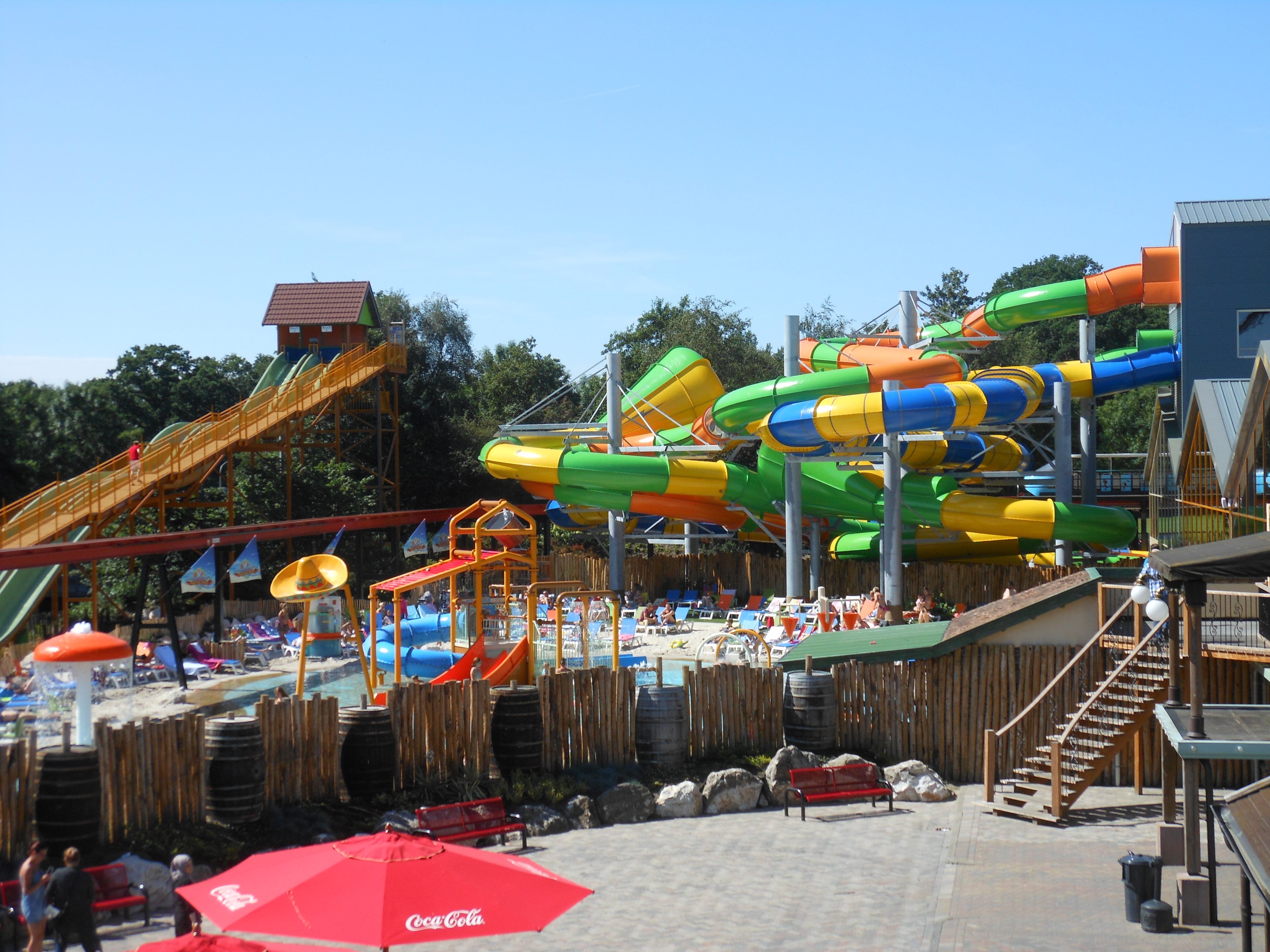 Het buitengedeelte van Aqua Mexicana, het in 2015 geopende zwemparadijs van Vakantie- & Attractiepark Slagharen in Overijssel, Nederland. Gefotografeerd vanop de zetellift in het park.